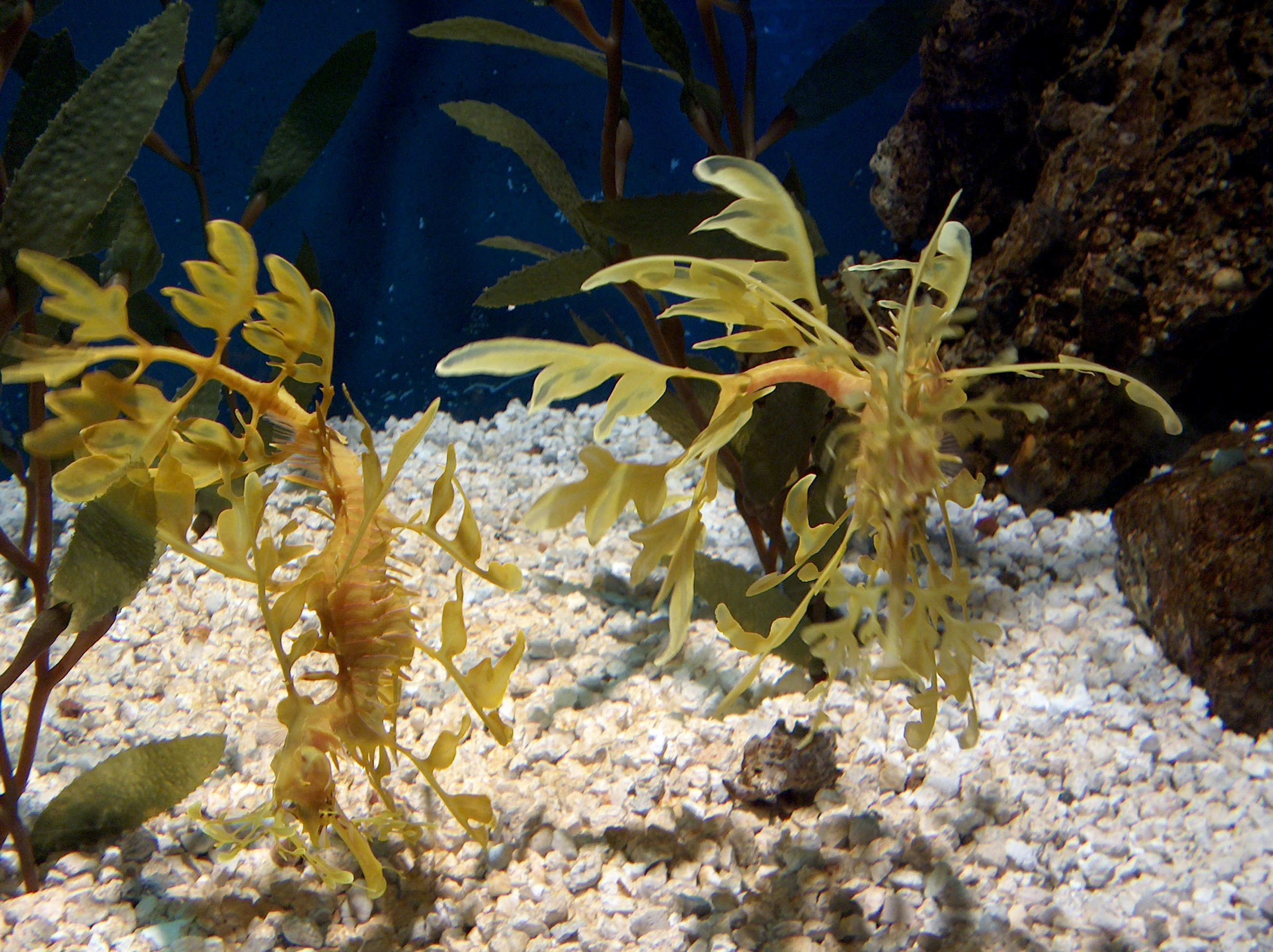 Peixe